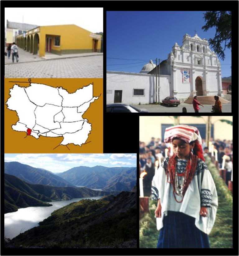 Distintas Fotos de Santa Cruz Verapaz